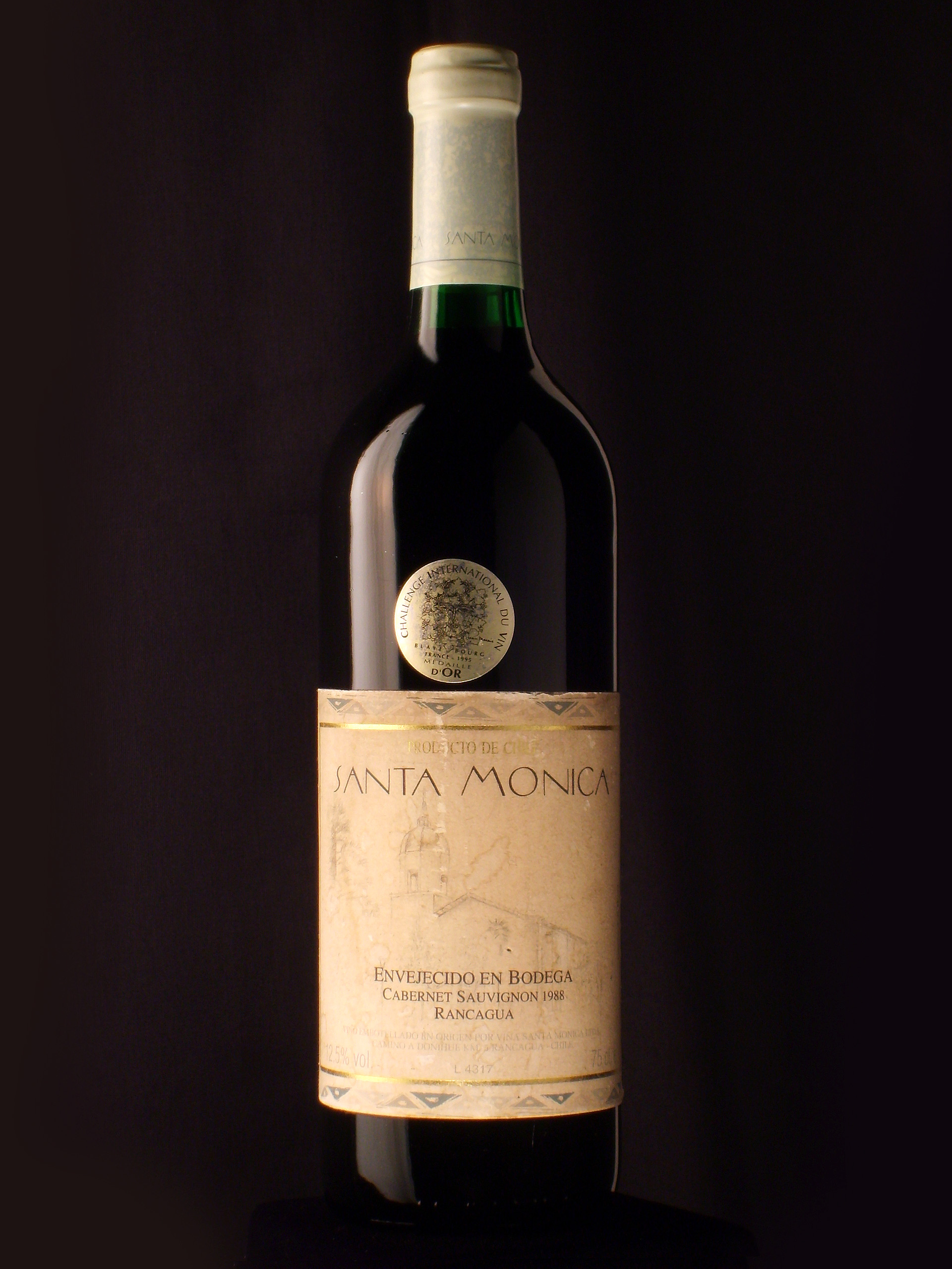 Botella de vino Santa Mónica, tipo Cabernet Sauvignon, año 1988. Producido en Rancagua, Chile, por Viña Santa Mónica.